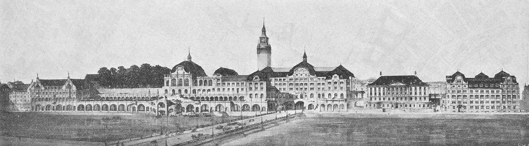 Projekt von Gustav Gull zum Bau einer neuen Stadthausanlage in Zürich.